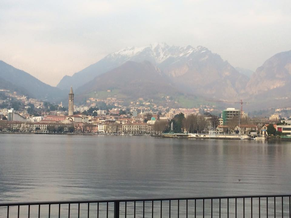 Lumbaart: El mont Dò Man con denanz Lecch, veduu de Malgraa, de l'oltra banda del lagh.